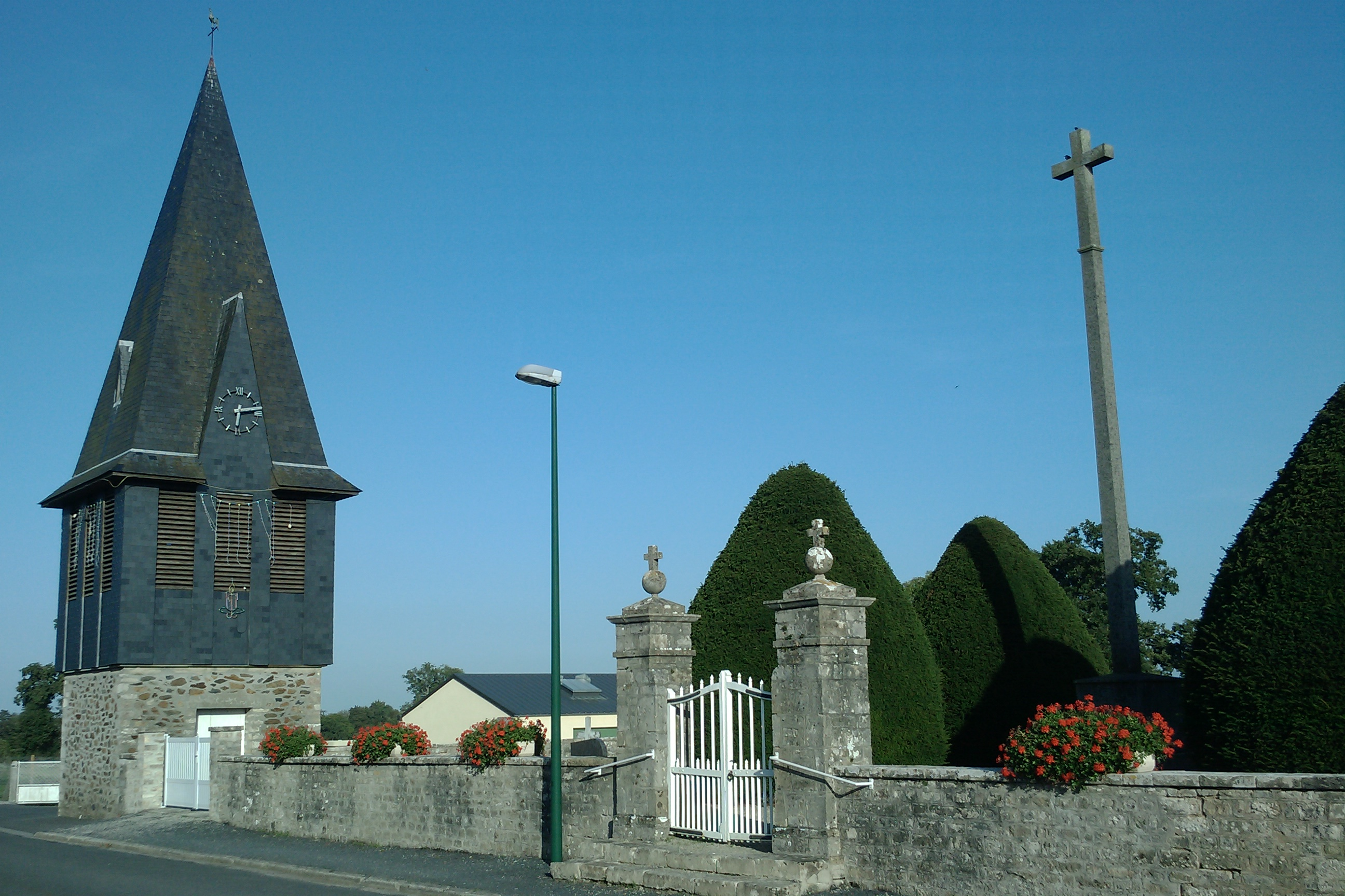 Église Saint-André de Saint-André-de-Bohon